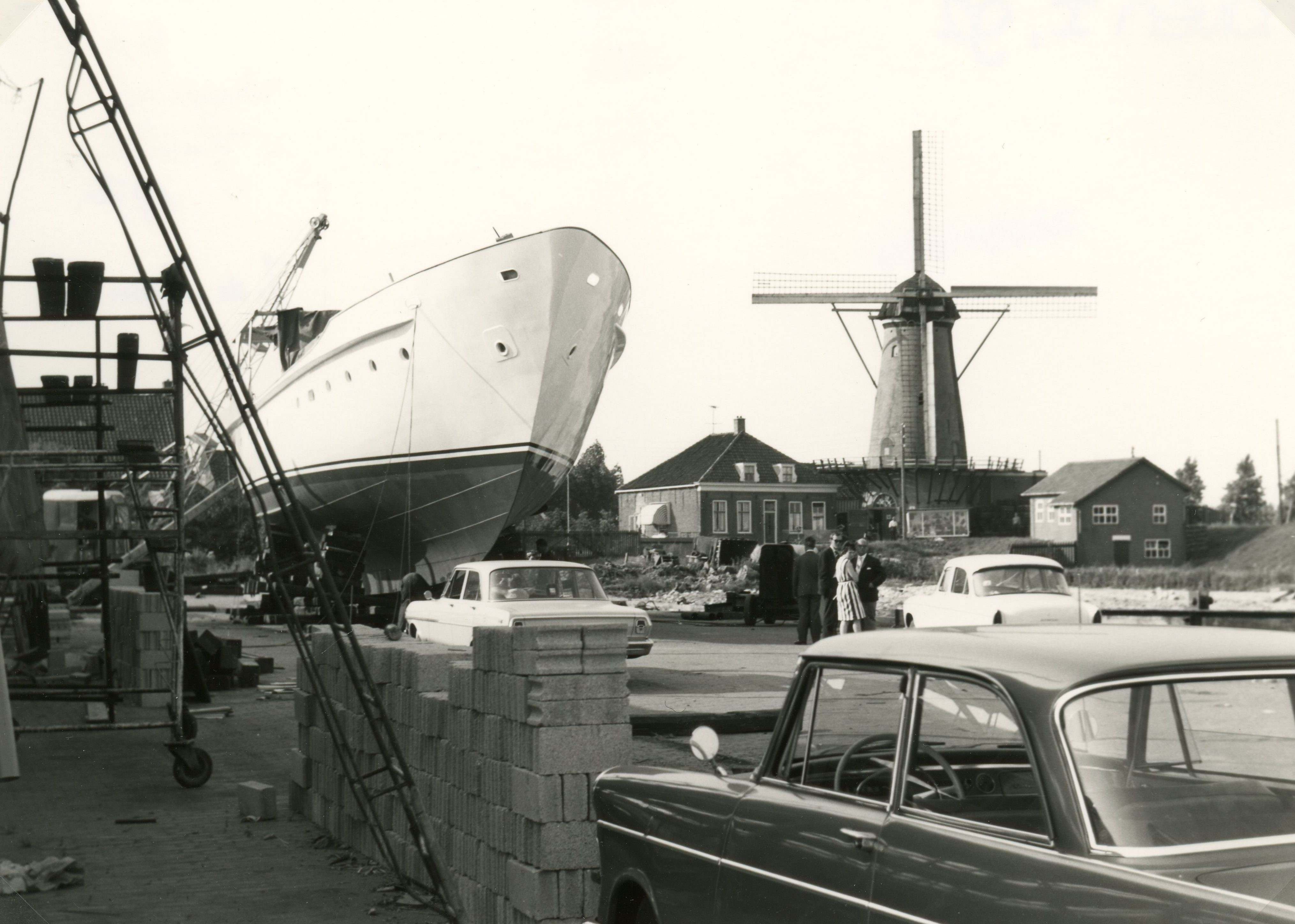 Scheepswerf Van Hamburg bij Noordeinde Spijkenisse ±1970. De scheepswerf is weg, evenals het gebouw rechts en de molen is opgehoogd.